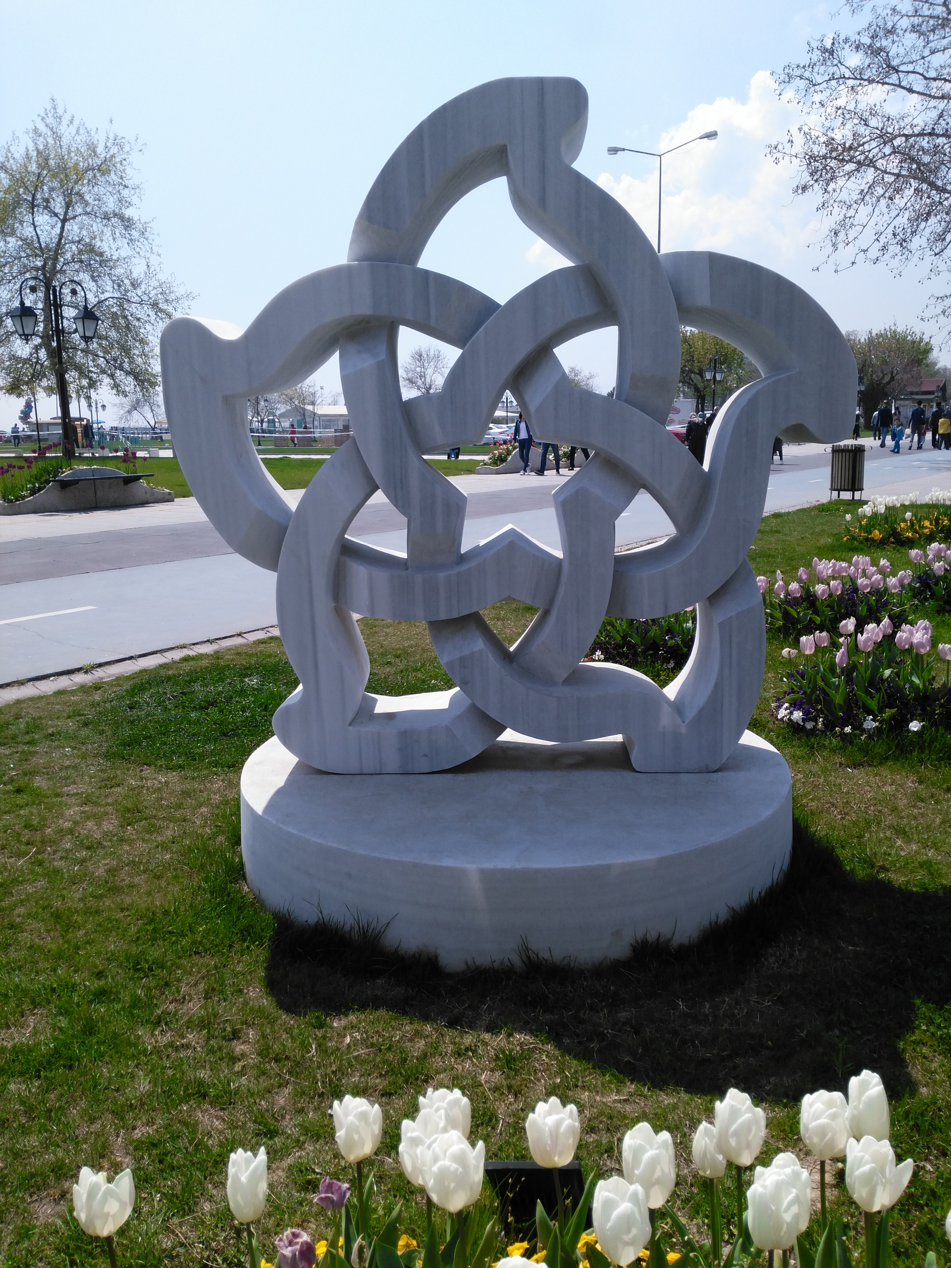 Tekirdağ'ın Süleymanpaşa ilçesinin mermer logosu.